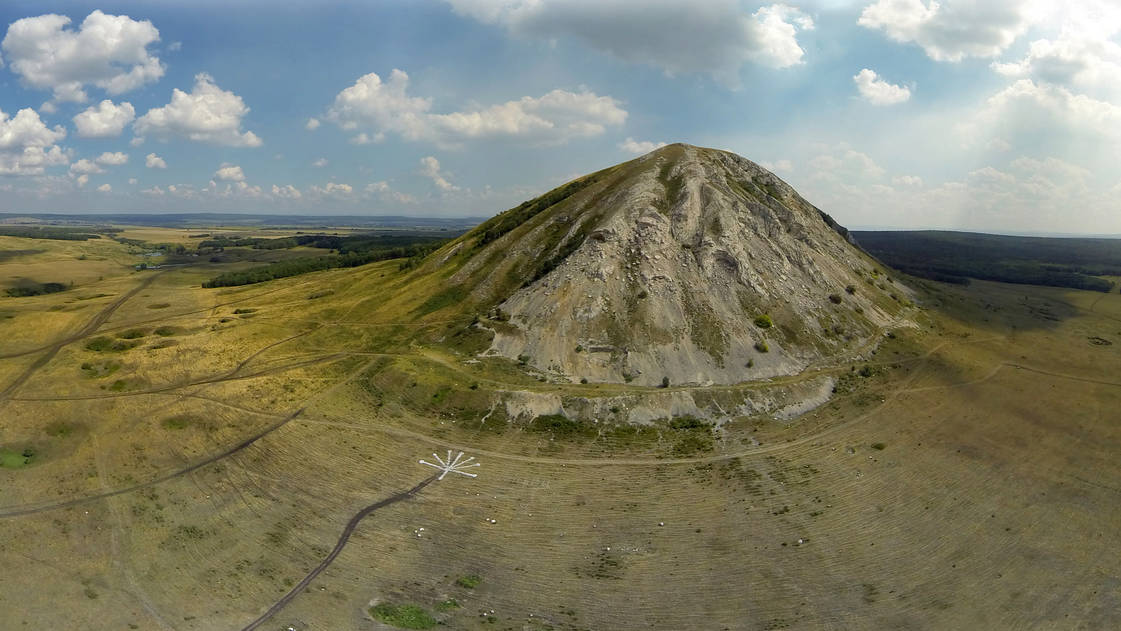 Гора Тра-тау, Ишимбайский район This image is related to the protected area of Russia number 0210153